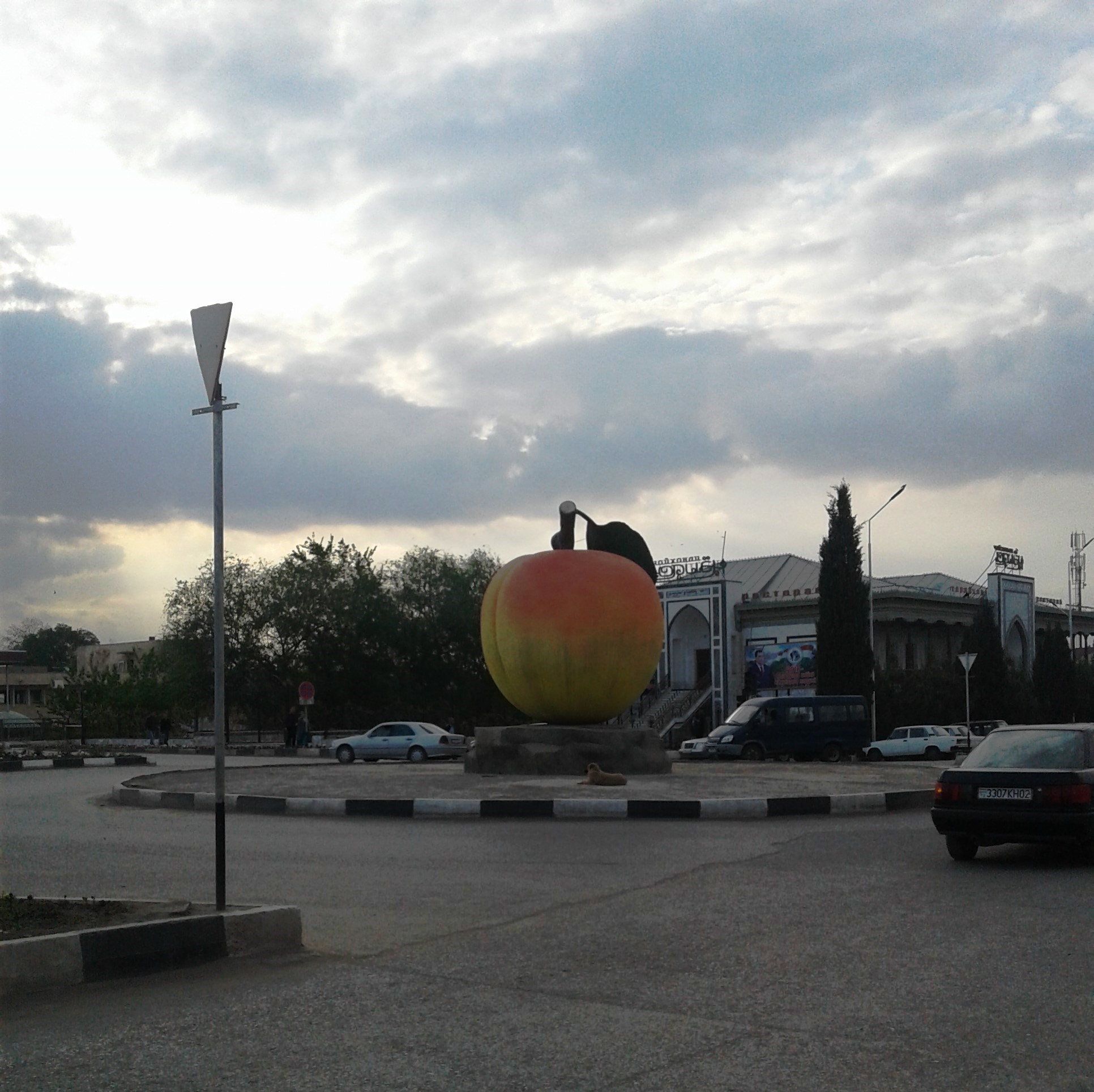 Символ г. Исфара Согдийской области, Таджикистан. Памятник Абрикосуна одном из площадей города